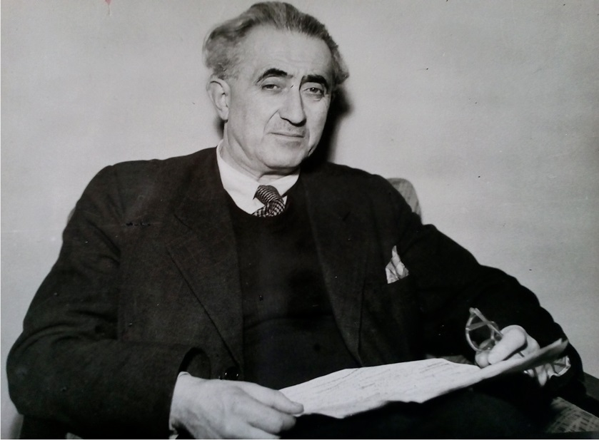 Ettore Lo Gatto